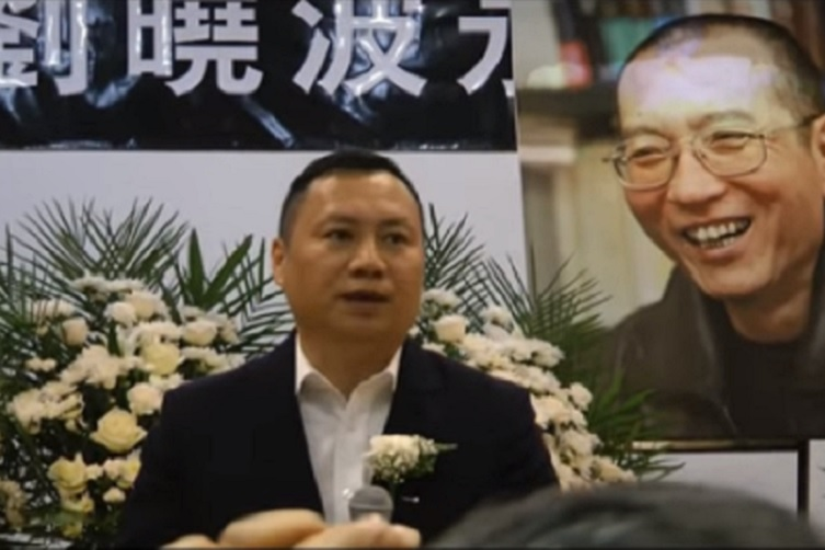 劉曉波病逝